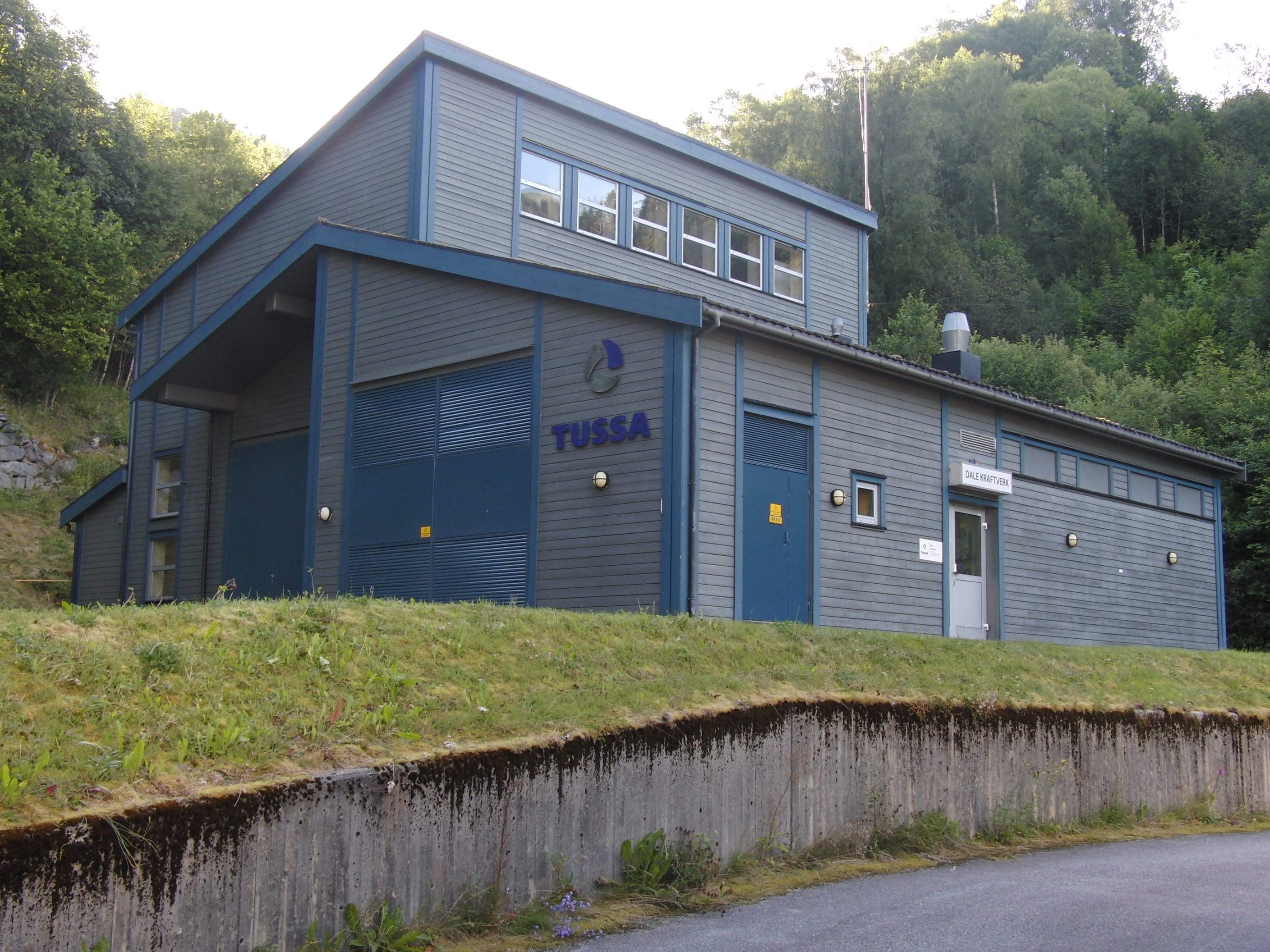 Dale kraftverk (Volda)